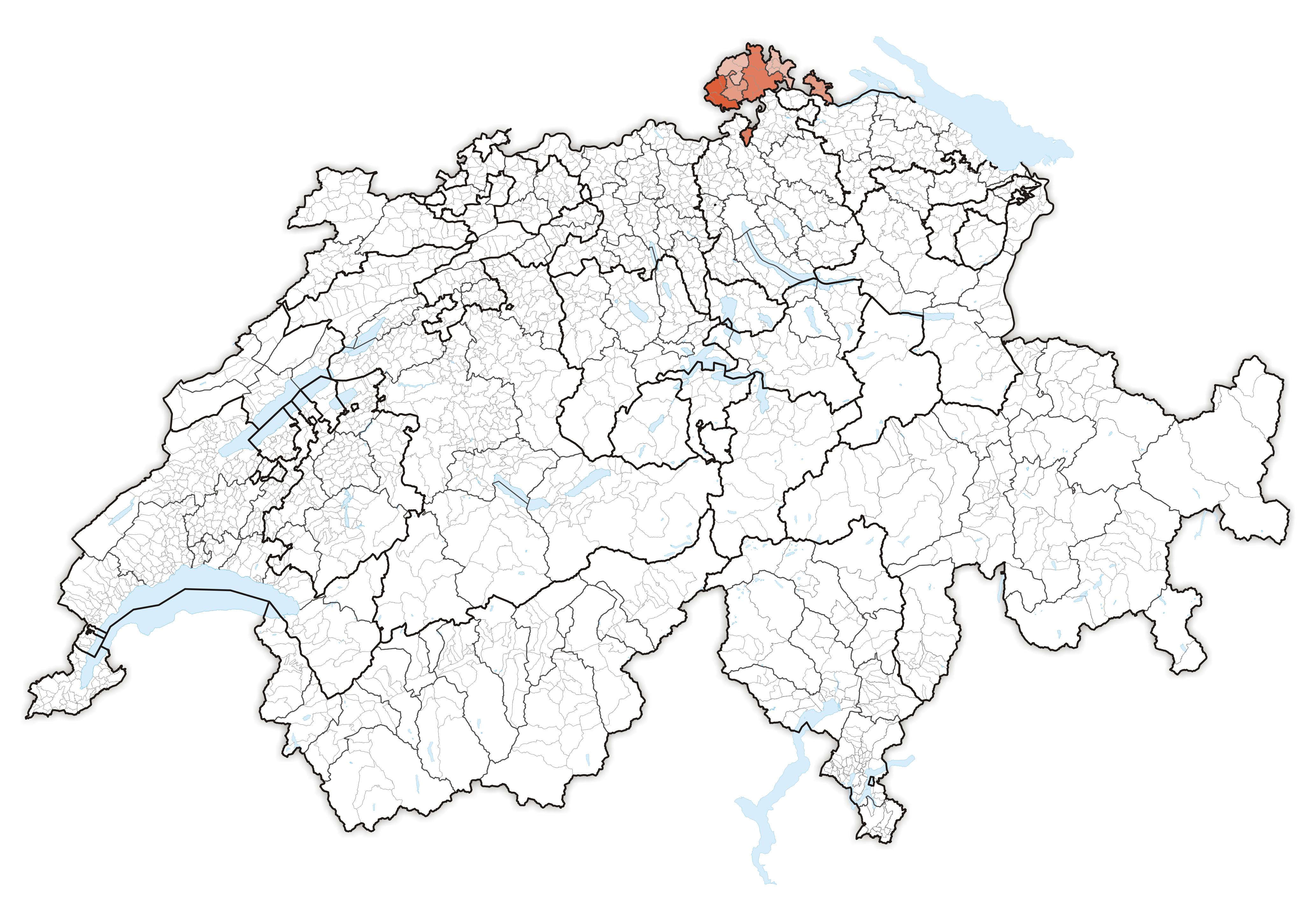 Canton Schaffhausen